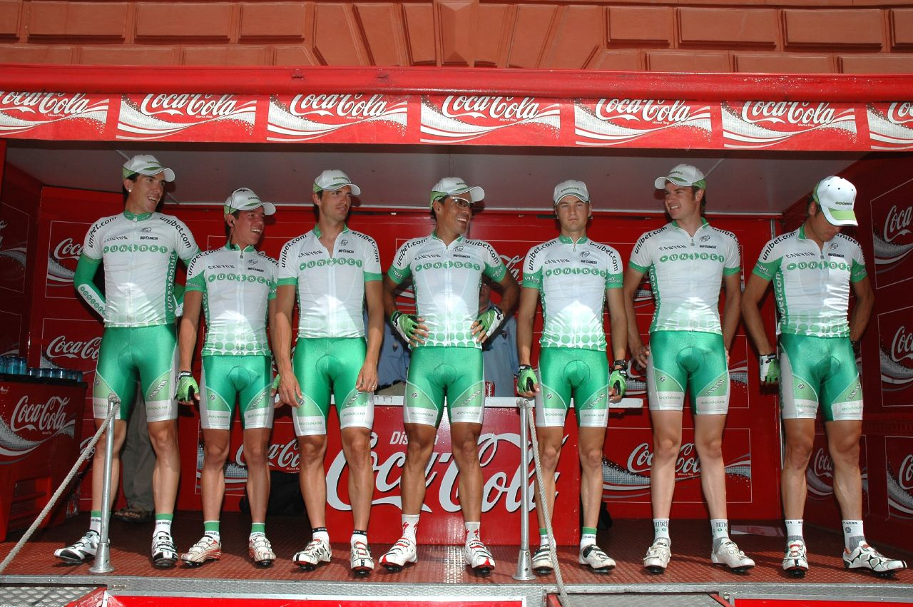 Euskal Bizikleta 2007